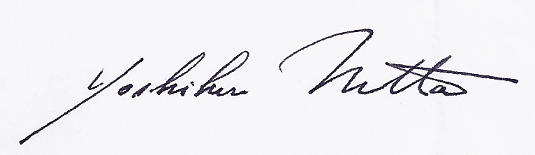 Signatur seines Briefes an mich vom Dezember 25.6.2012